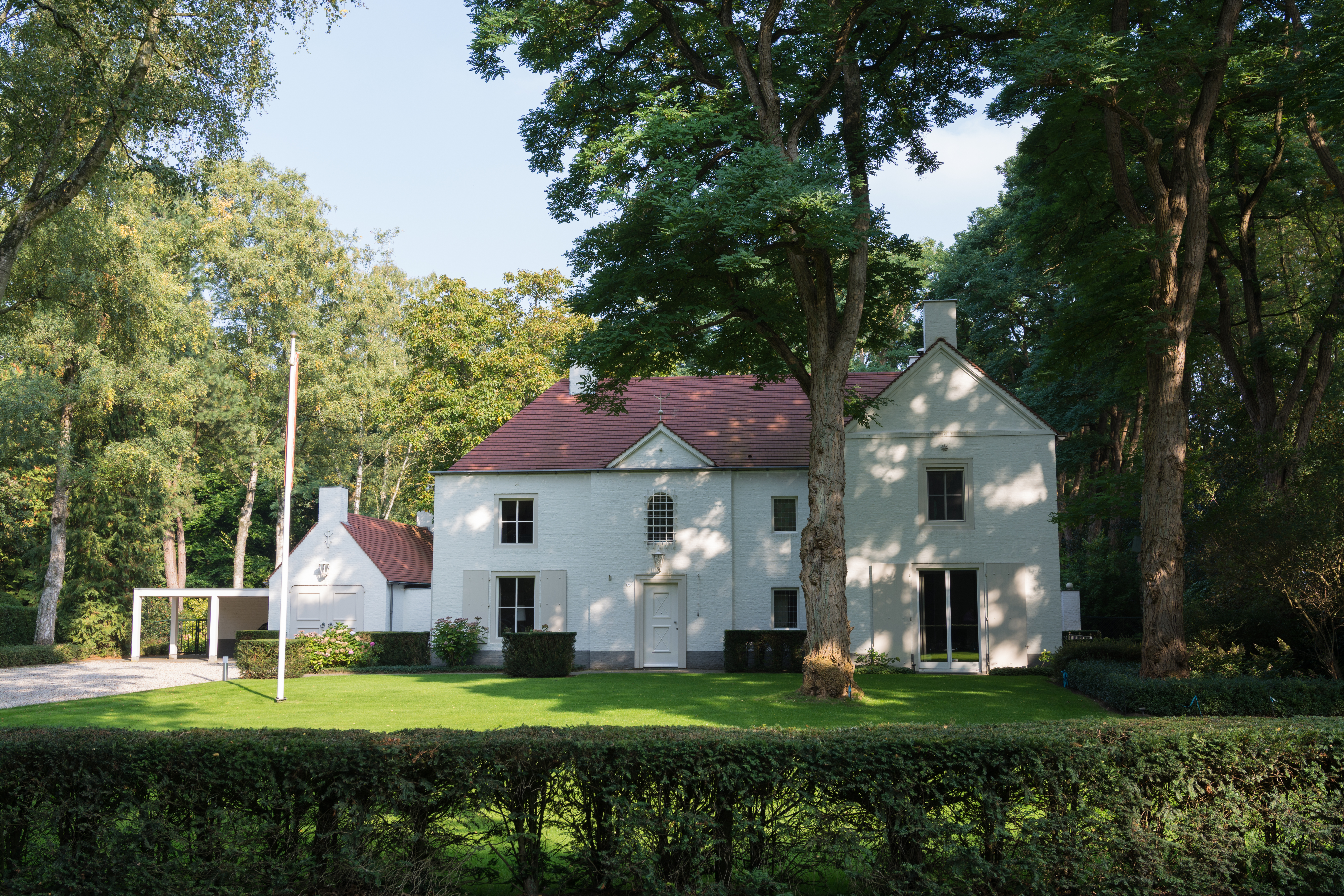 Het woonhuis aan de Tilburgseweg 195a werd gebouwd door de heer Broekhuijsen en mevrouw Elias naar een ontwerp van architect Jos. Bedaux. Een paar maanden na oplevering overleed de heer Broekhuijsen. Het huis werd hierna door Bernard Pessers uit Tilburg bewoond.De tuin is een ontwerp van Pieter Buys. De van de weg teruggelegde ligging geeft het huis een voorname uitstraling. Het statige karakter wordt versterkt door de geometrische opbouw van dak en gevel met classicistische elementen. De gevel in wit geschilderde baksteen is kenmerkend voor de hui­zen van Bedaux uit die periode. De woonkamer heeft na een verbouwing aan de achterzijde zicht op de tuin gekregen door openslaande deuren. In het oorspronkelijke ontwerp was deze gevel gesloten. In de tuin achter de woning staat een duiventil met windvaan van de hand van Jos. Bedaux die door de huidige eigenaar gerestaureerd is.Tussen de garage en het woonhuis staat een Mariabeeld in een nis. Aan de rechter zijgevel bevindt zich een zonnewijzer.